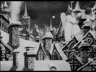 Photographie du film "Le rêve de noël" (1900) de Georges Méliès